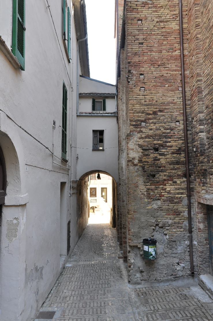 Penne (comune, Italy) 2012